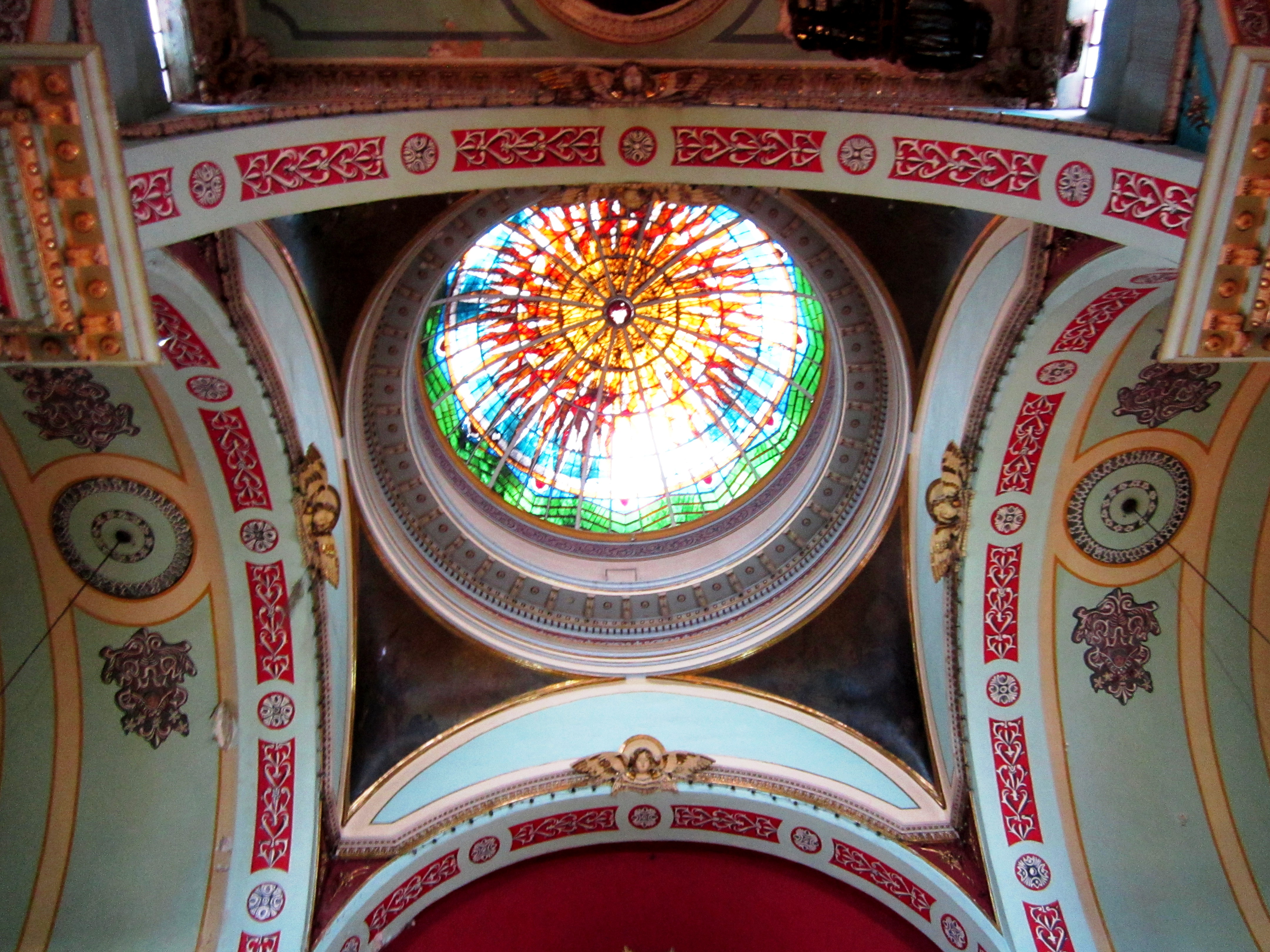 Cúpula de la basílica del Voto Nacional, localidad de Los Mártires, centro de la ciudad de Bogotá.